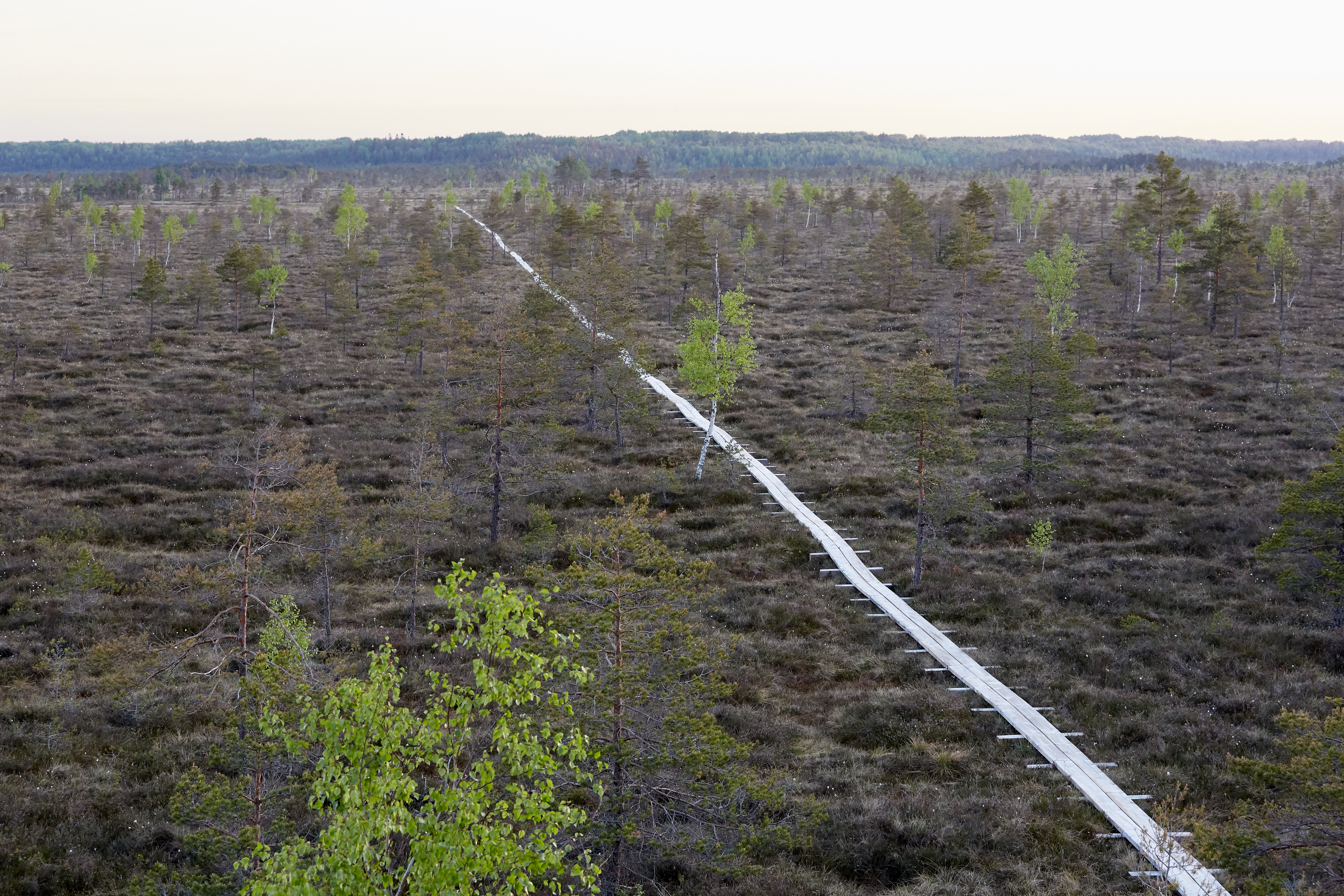 Nigula raba 2018. aasta kevadel